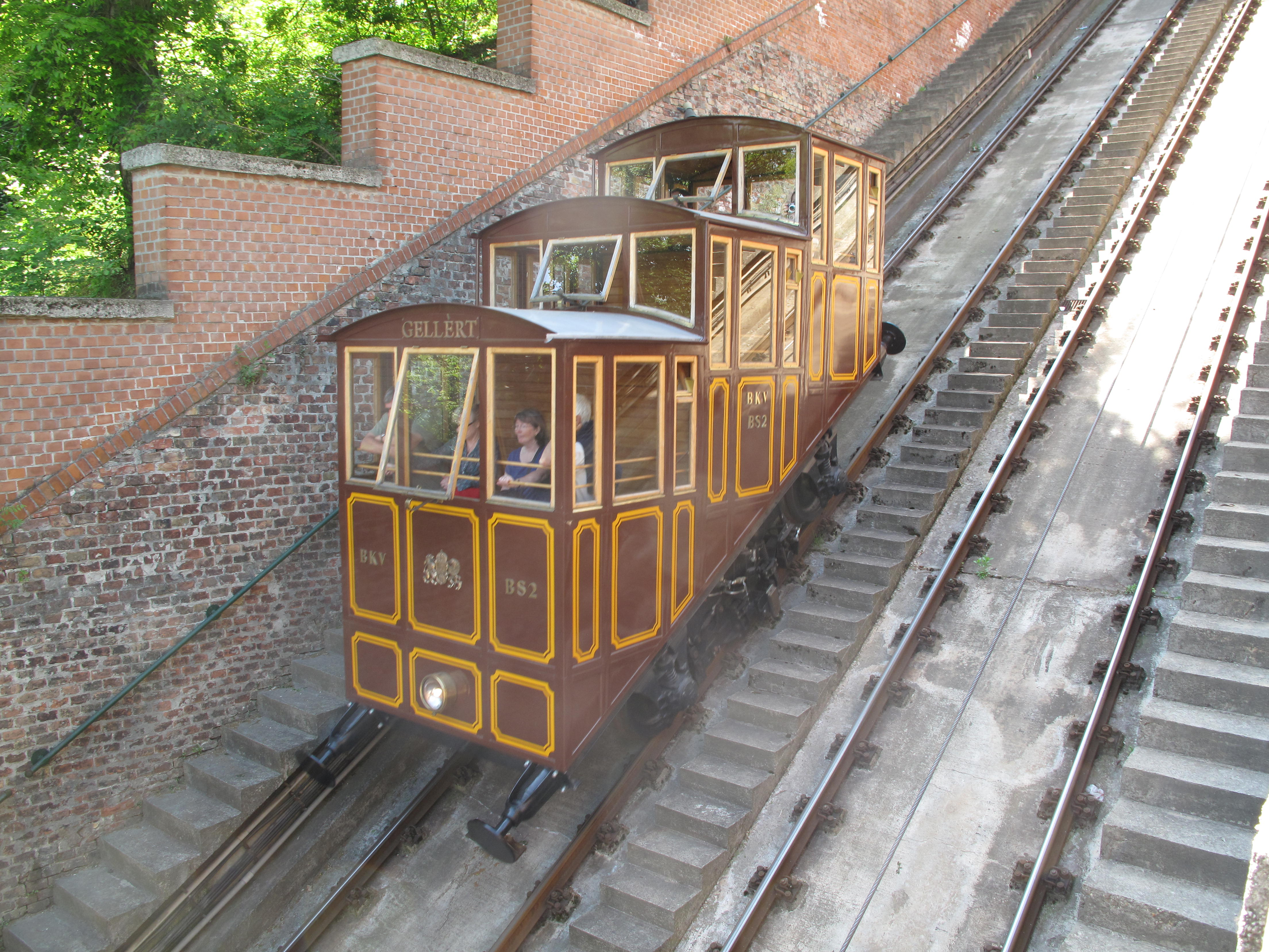 Budapešť, lanovka k hradu